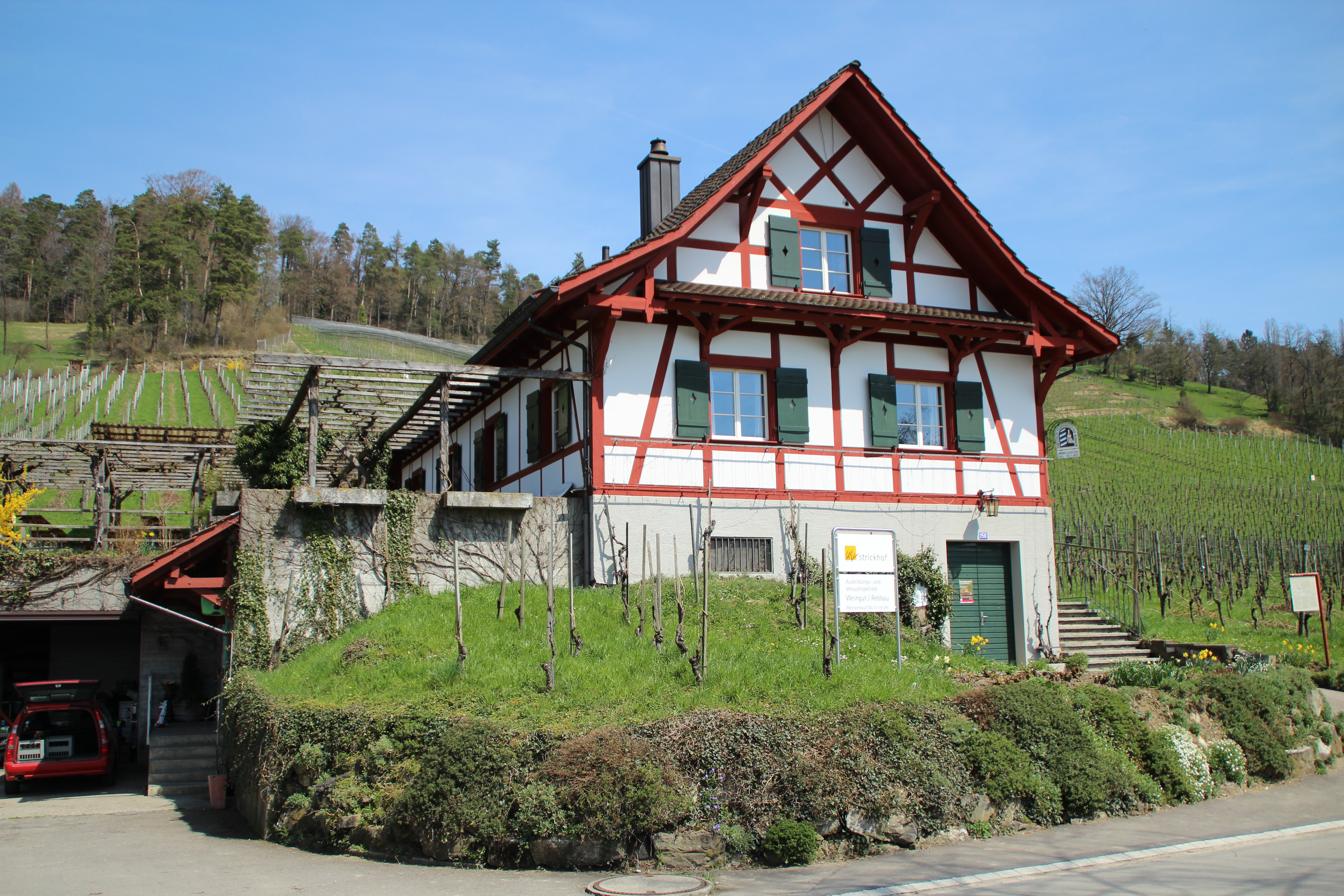 Gebäude der Landwirtschaftlichen Schule Strickhof am Wolfensberg oberhalb Wüflingen